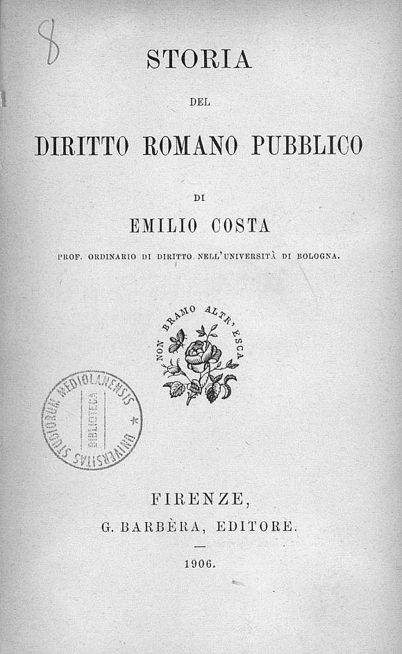 Frontespizio